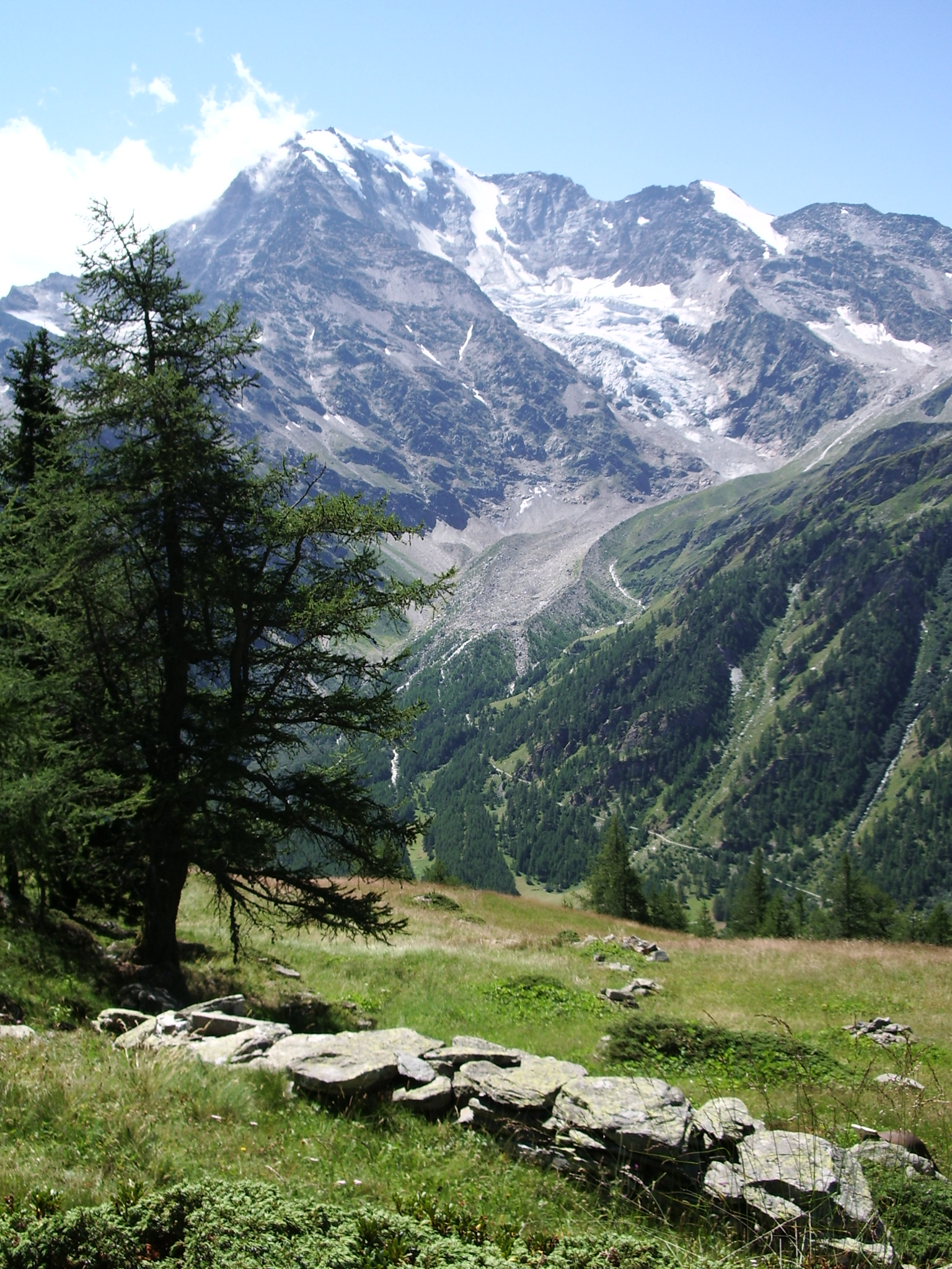 Fletschhorn, aufgenommen zwischen Simplonpass und Dorf Simplon. Foto selbst gemacht im Sommer 2006